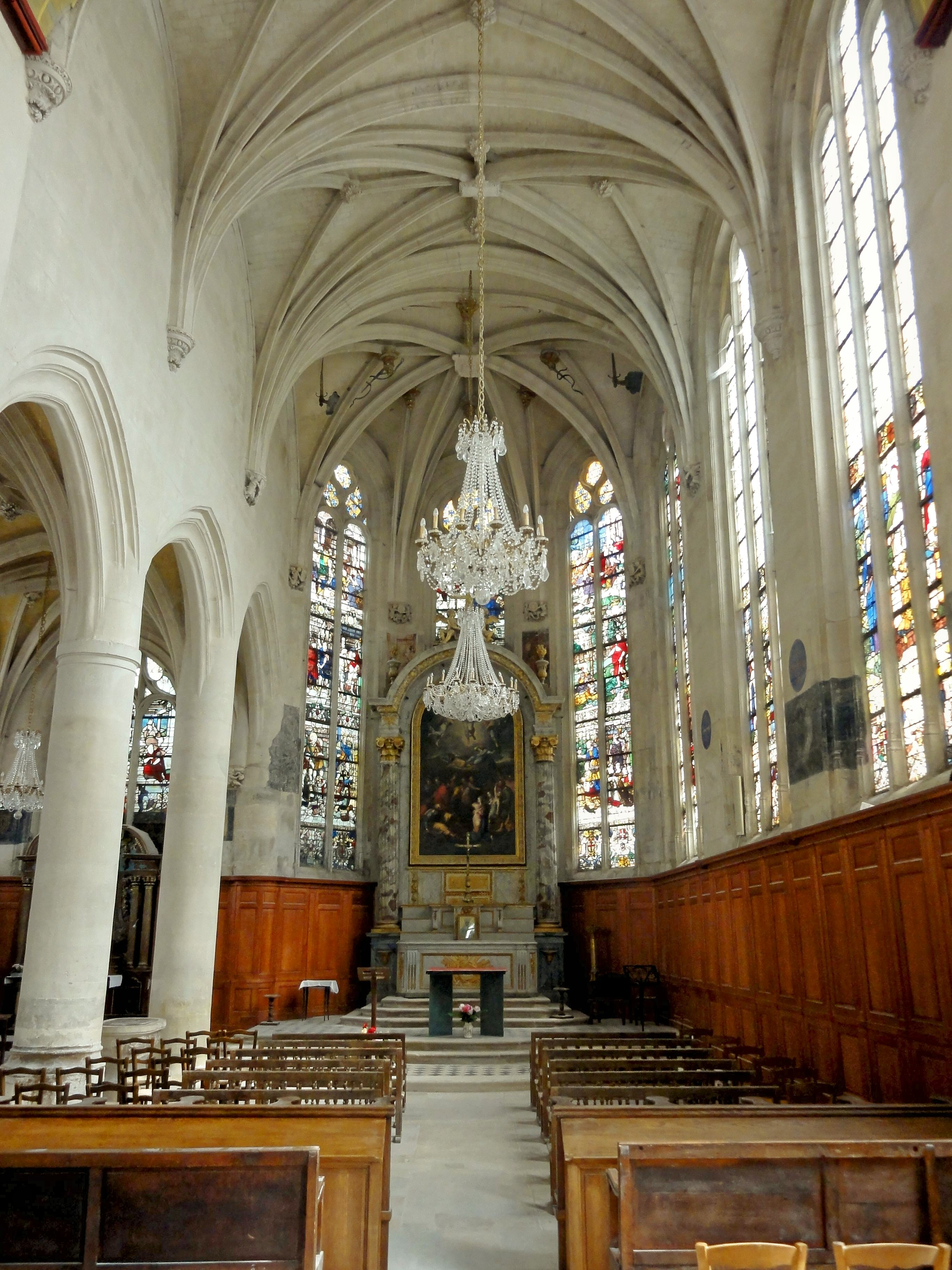 Chœur.